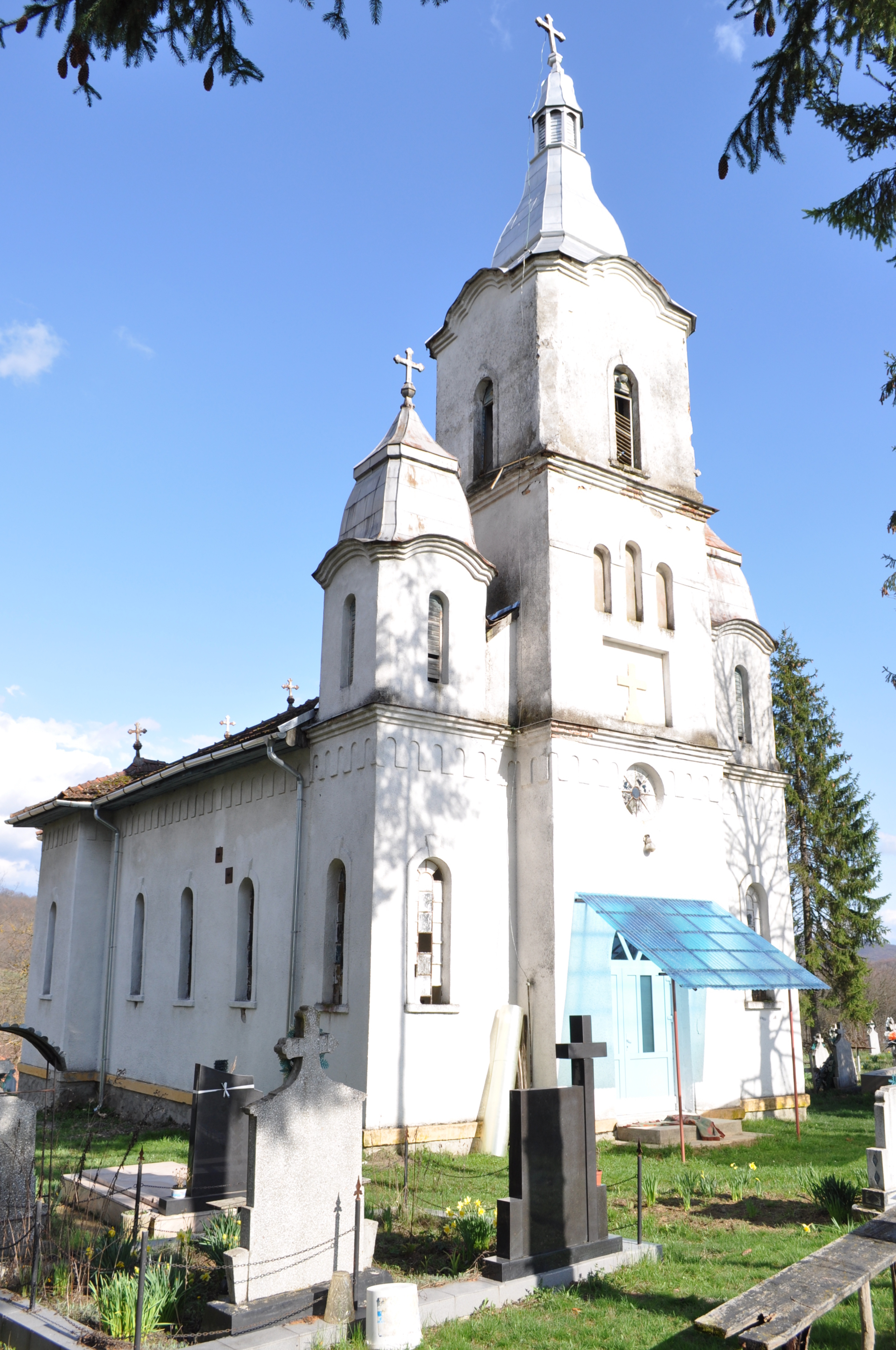 Biserica „Sf. Nicolae", sat DOBROŢ; comuna TOMEŞTI